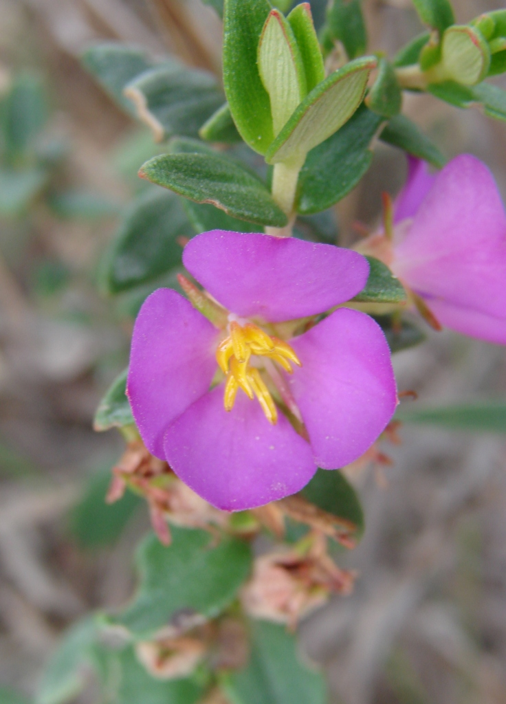 Marcetia harleyi - MELASTOMATACEAE - Parque Nacional da Chapada Diamantina - Palmeiras - Bahia - Brasil.